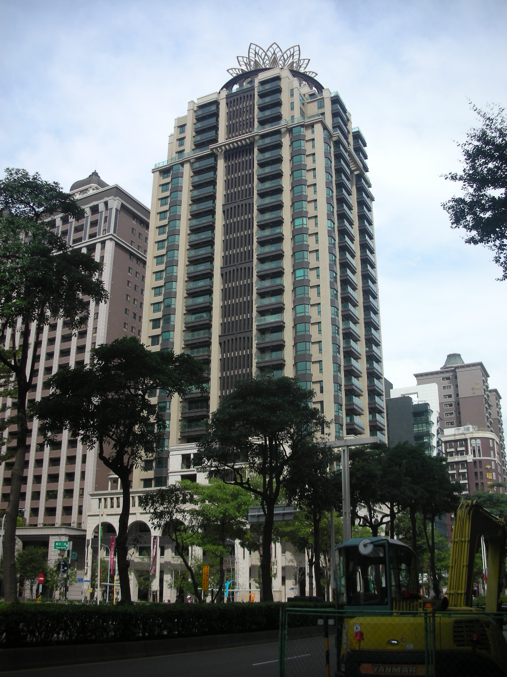 麗寶芙蓉匯為桃園市桃園區的高層住宅建築，高122.5公尺。